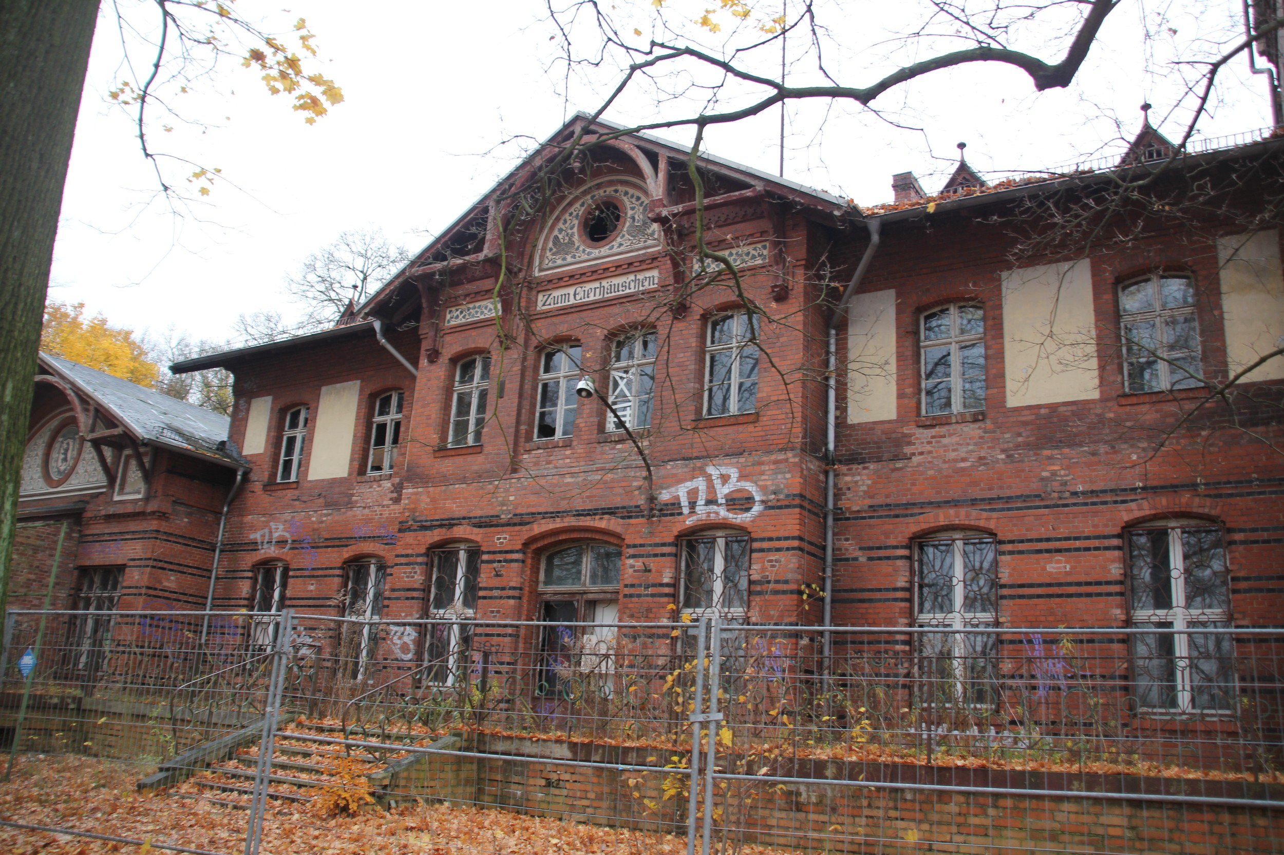 Das Eierhäuschen im Jahr 2012